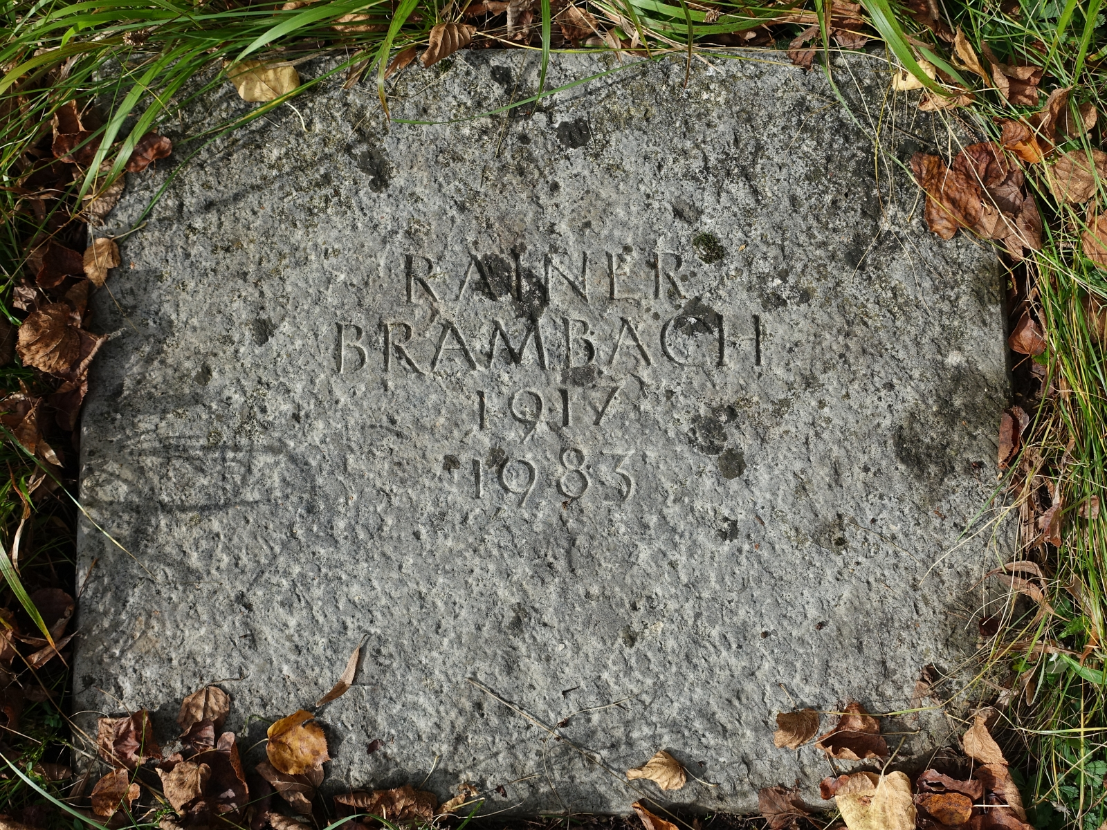 Rainer Brambach (1917-1983) Schriftsteller, Lyriker. Prominenten Grabfeld Friedhof am Hörnli